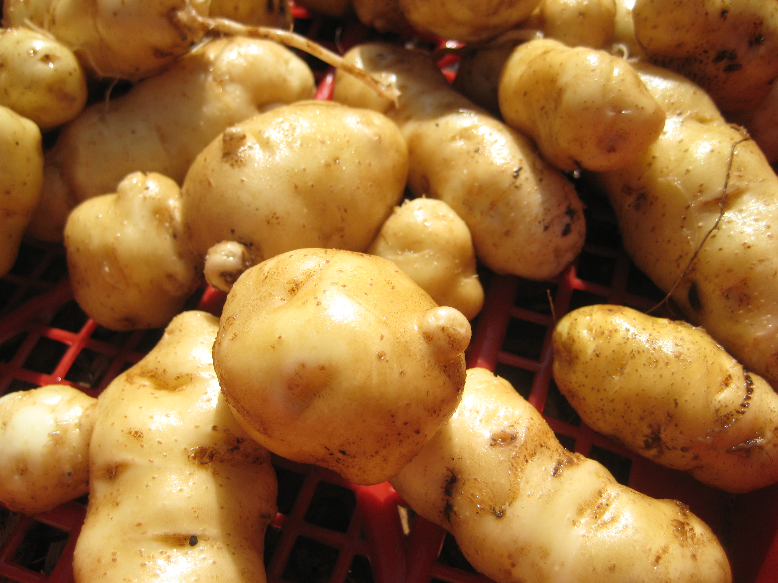 Tubercules de pomme de terre Ozette